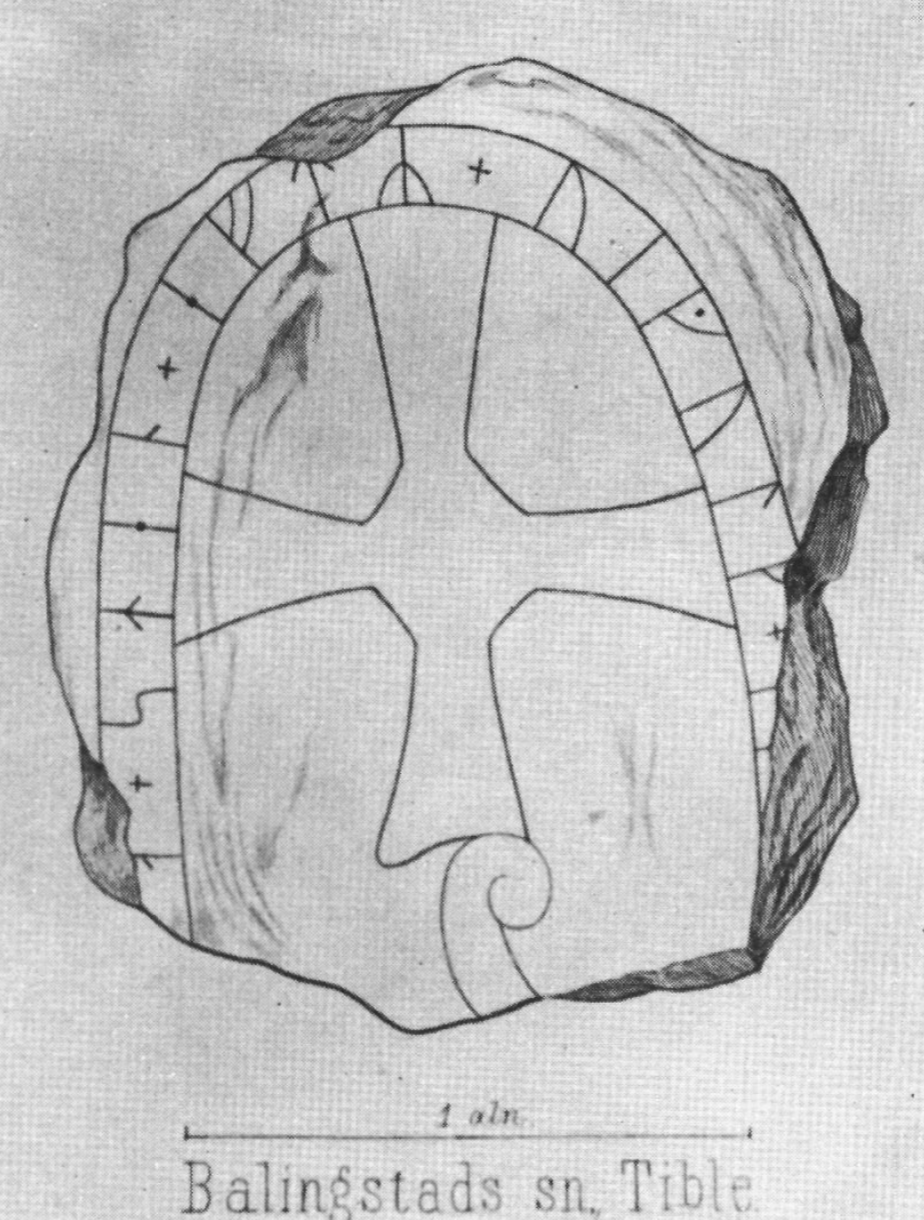 U 863. Tibble, Baliugsta sn. Efter Dybeck i Sveriles runurkunder (1862)